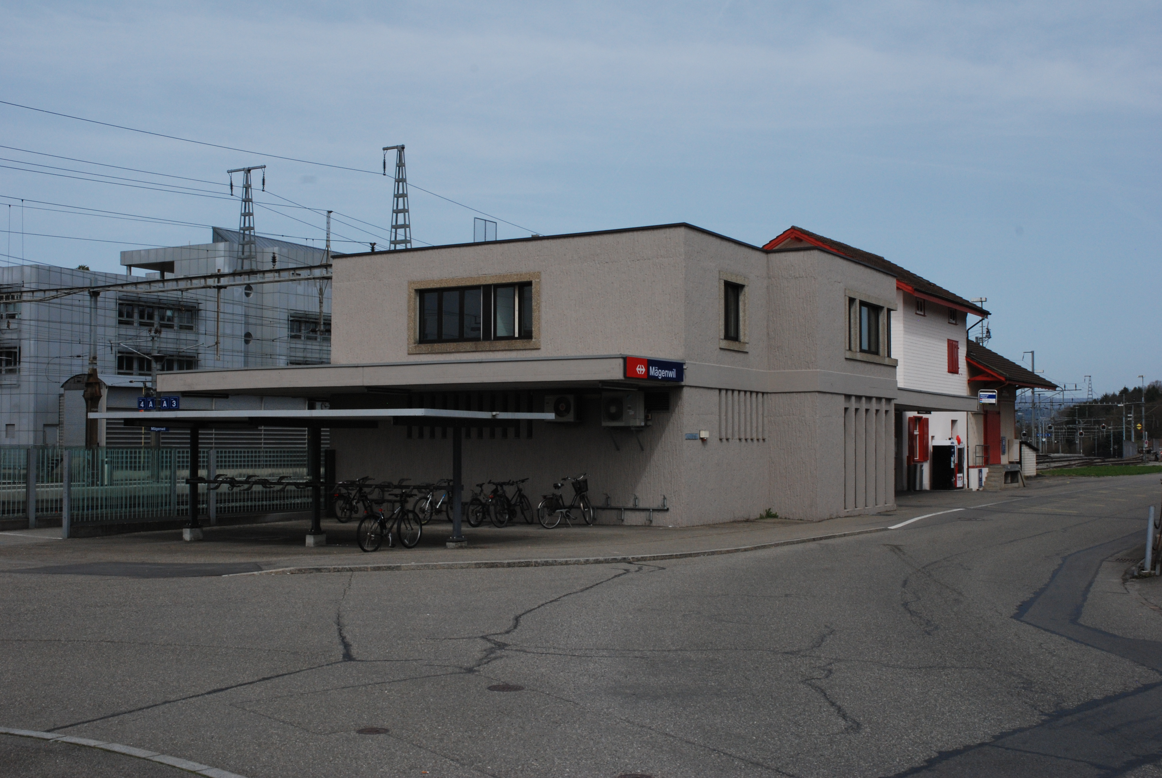 Bahnhofsgebäude Mägenwil